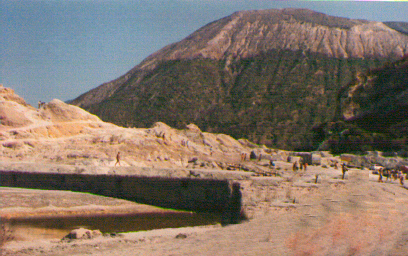 Autore Giuseppe Picciolo Fotografia scattata nell'isola di Vulcano nei pressi del vulcano La Fossa e del laghetto di fango sulfureo. Pubblico dominio